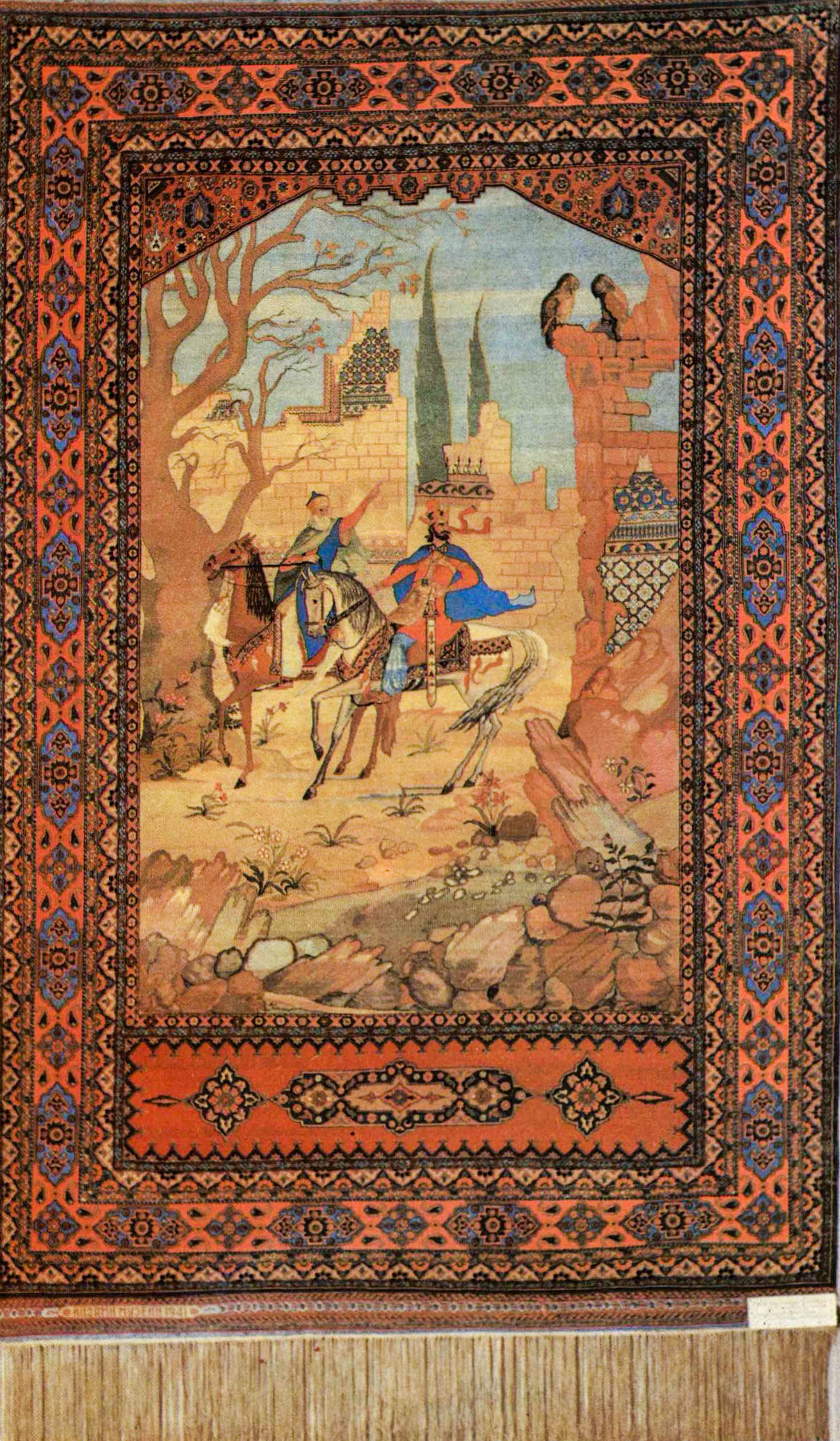 Ədalətli Nuşirəvan və bayquşların söhbəti, Lətif Kərimov və Kazım Kazımzadə 1939, Azərbaycan Ədəbiyyat Muzeyi